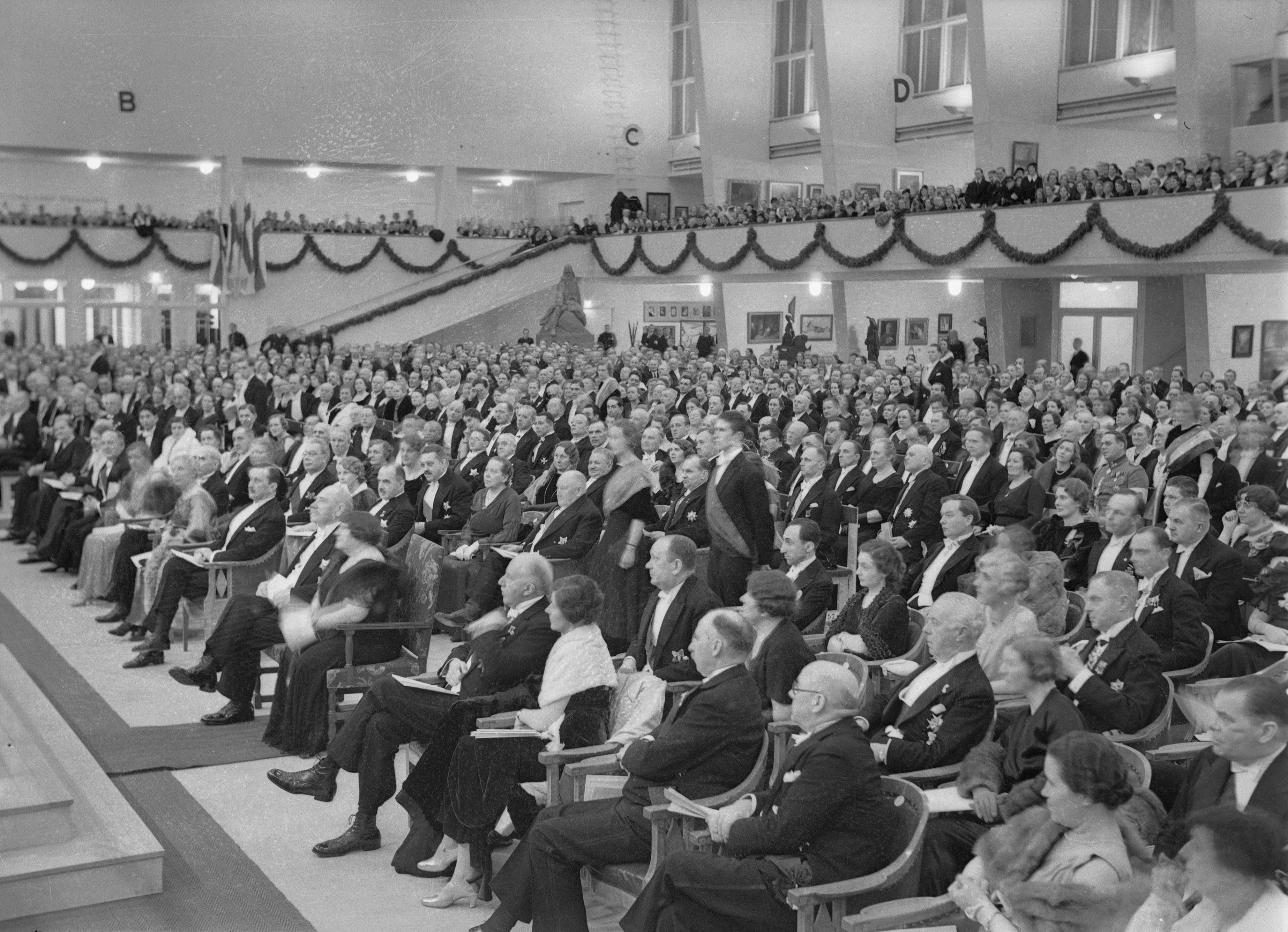 Kalevalan 100-vuotisjuhla Helsingin Messuhallissa vuonna 28.2.1935.